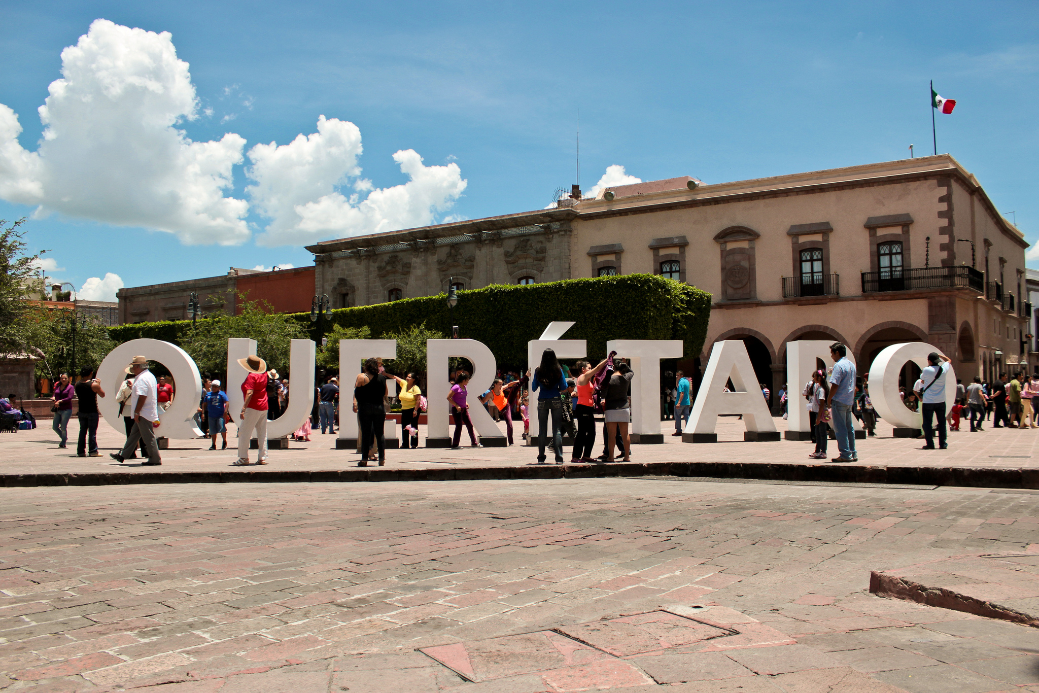 Ciudad de Queretaro